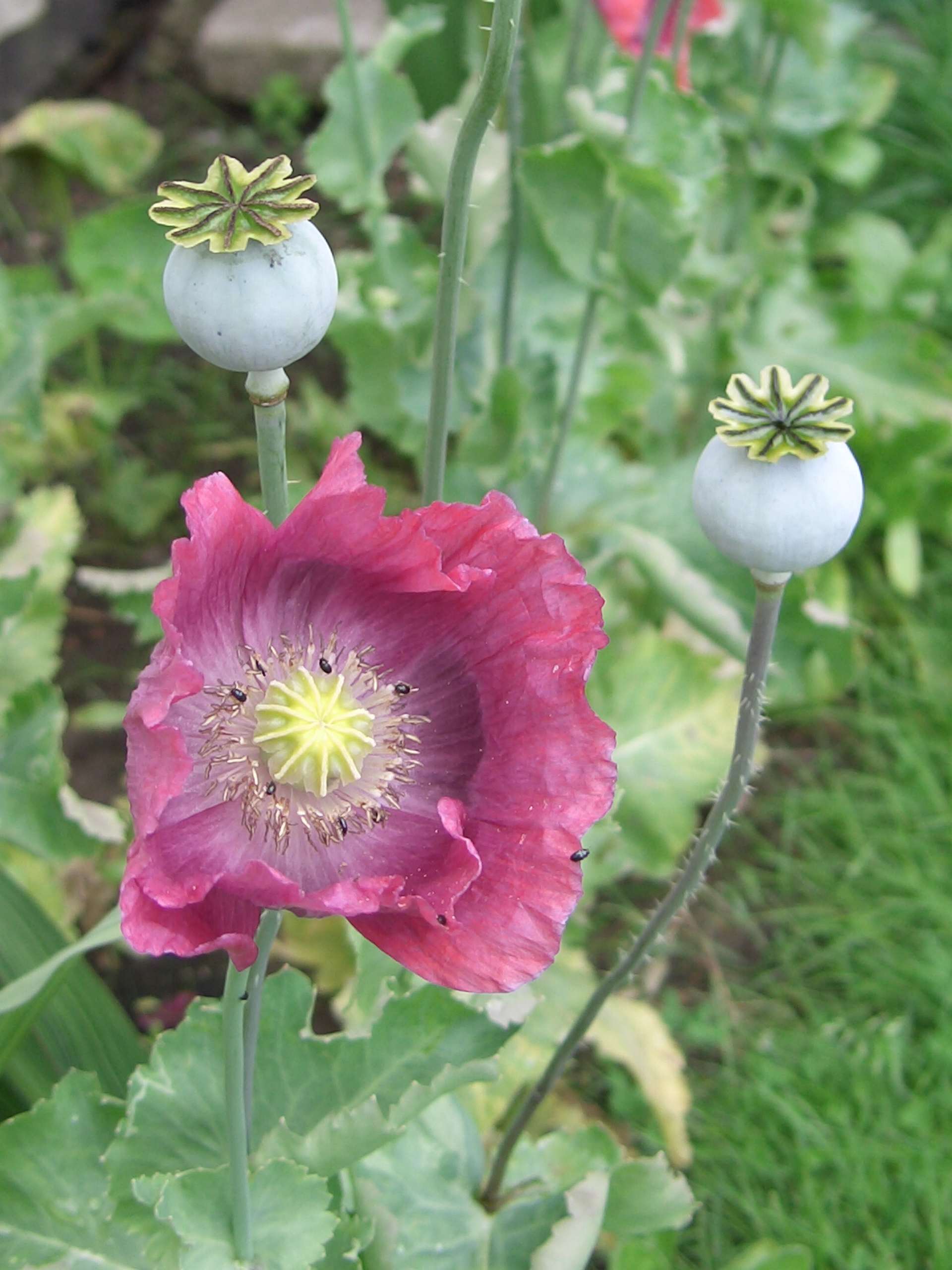 Lila Schlafmohn